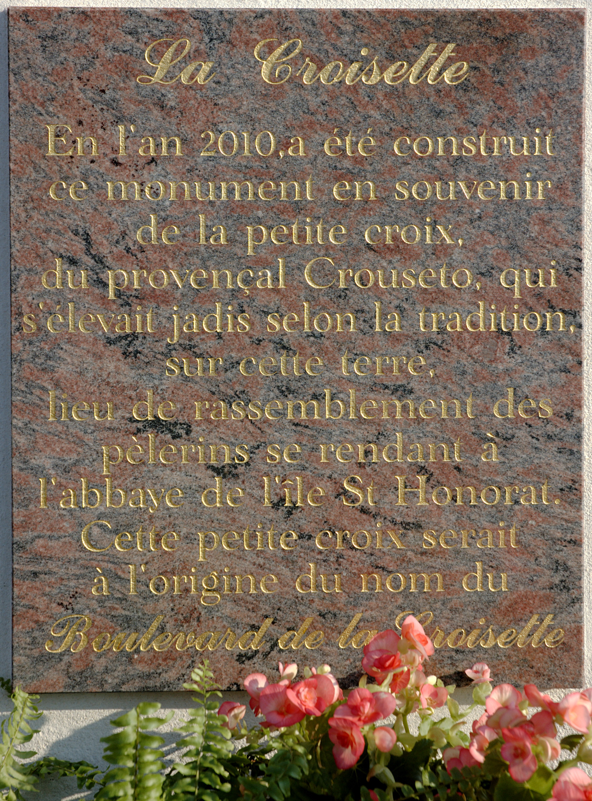 Сей монумент воздвигнут в 2010 году в память малого креста (на провансальском — Crouseto), который согласно традиции некогда возвышался на этом месте, где собирались паломники, направляющиеся в монастырь на острове Святого Гонората. Этот малый крест дал название бульвару Круазет.